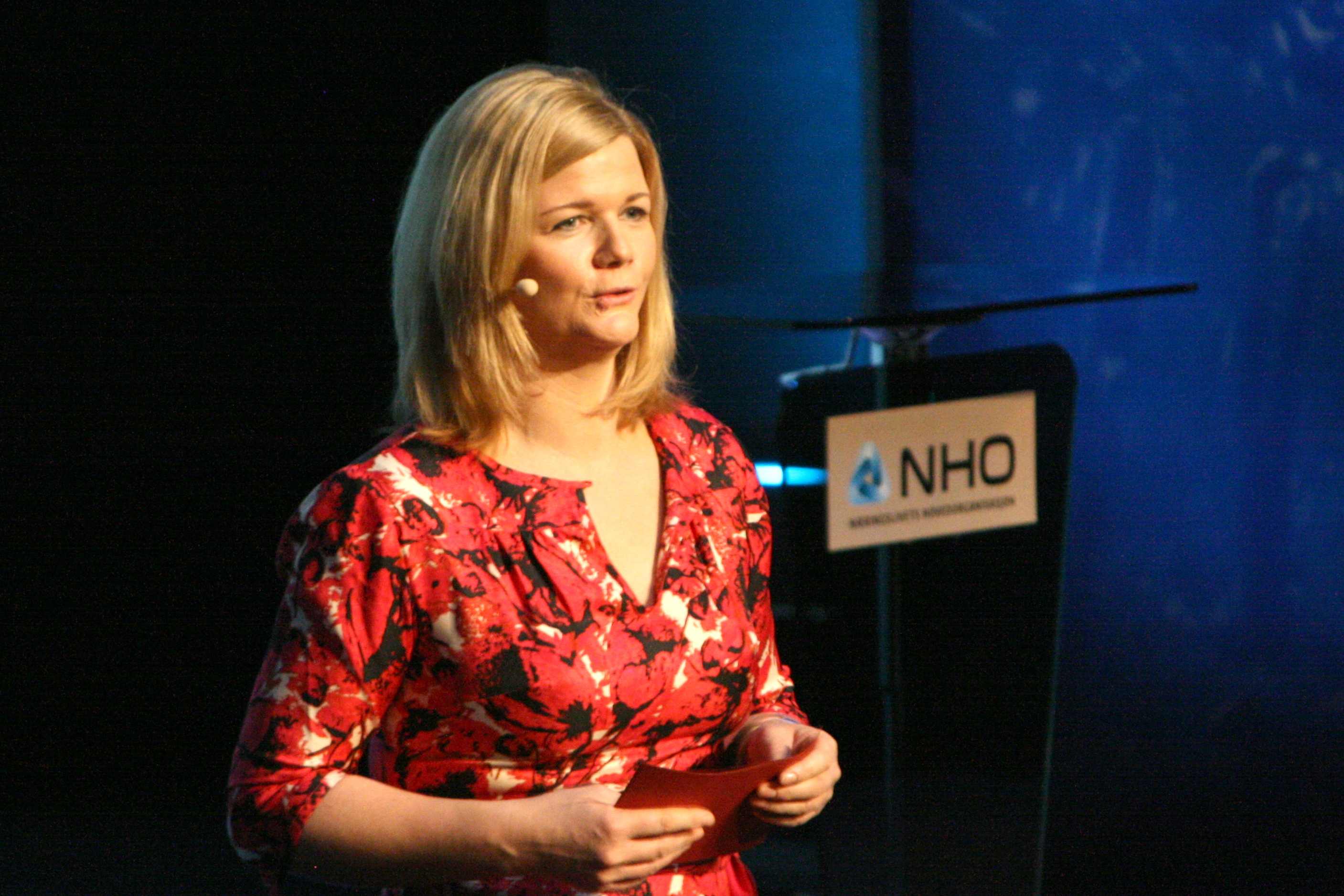 Anne Lindmo, NRK-programleder. Fra NHOs Årskonferanse 2009.